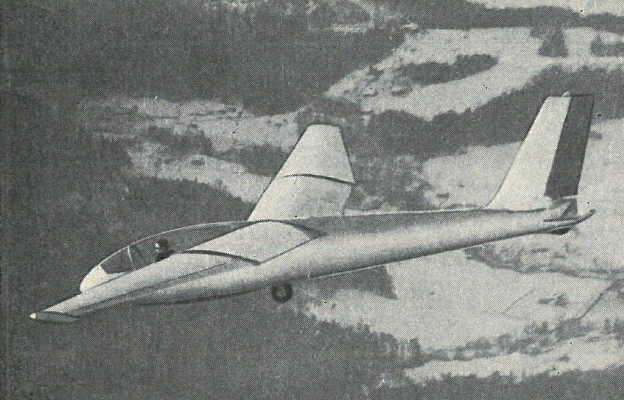 Szybowiec SZD-27 Kormoran